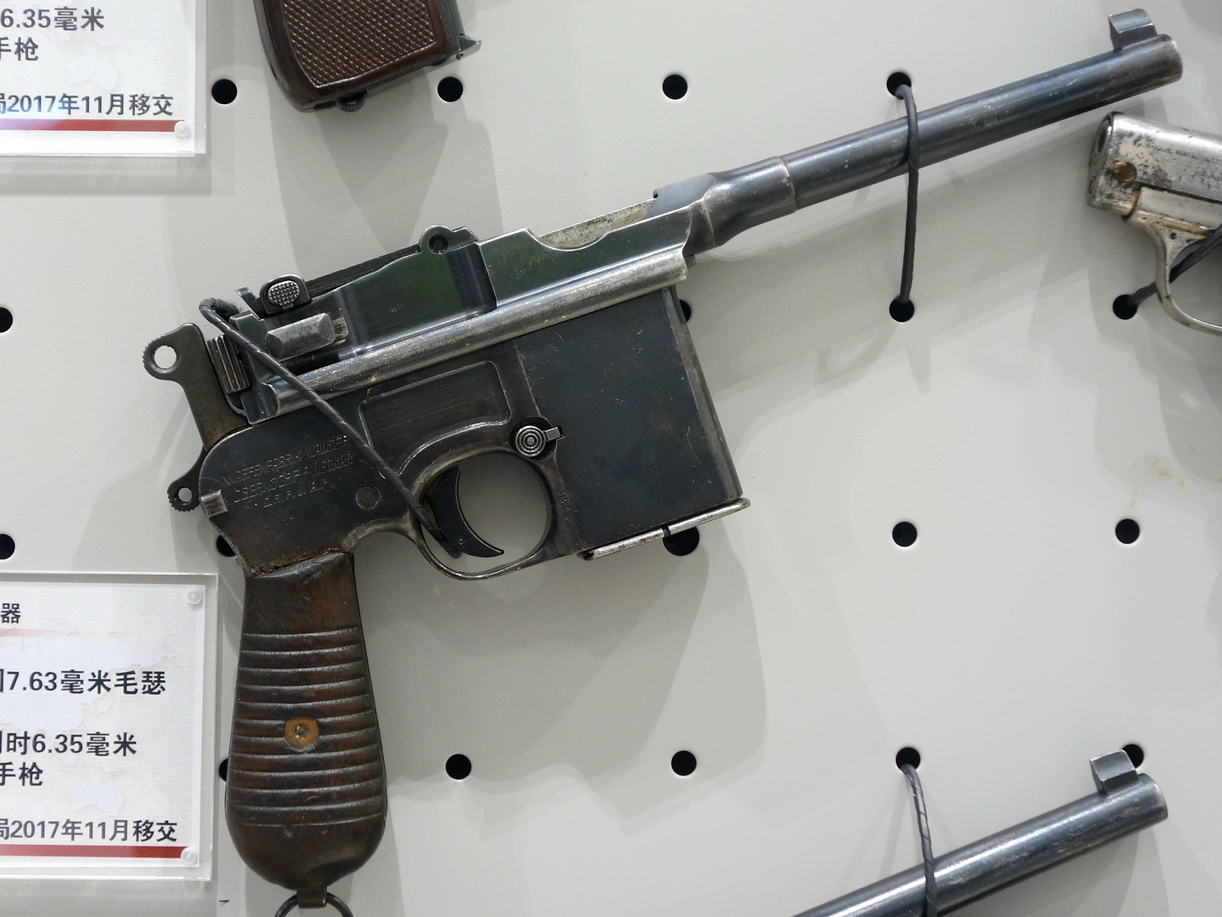 德国造毛瑟M1932式7.63mm手枪，许世友将军曾使用，保存在中国人民革命军事博物馆。